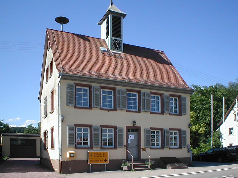 Schulhaus in Leimen-Ochsenbach, erbaut 1837, erweitert 1877, im Besitz der Bürgerschaft seit 1993